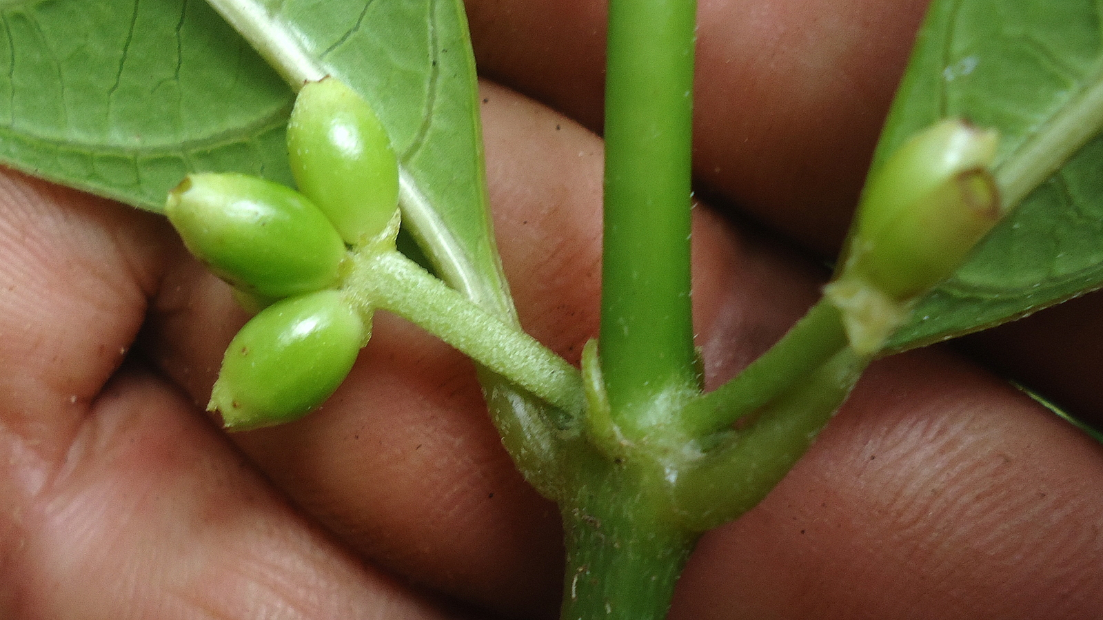 Ronabea latifolia Aubl.